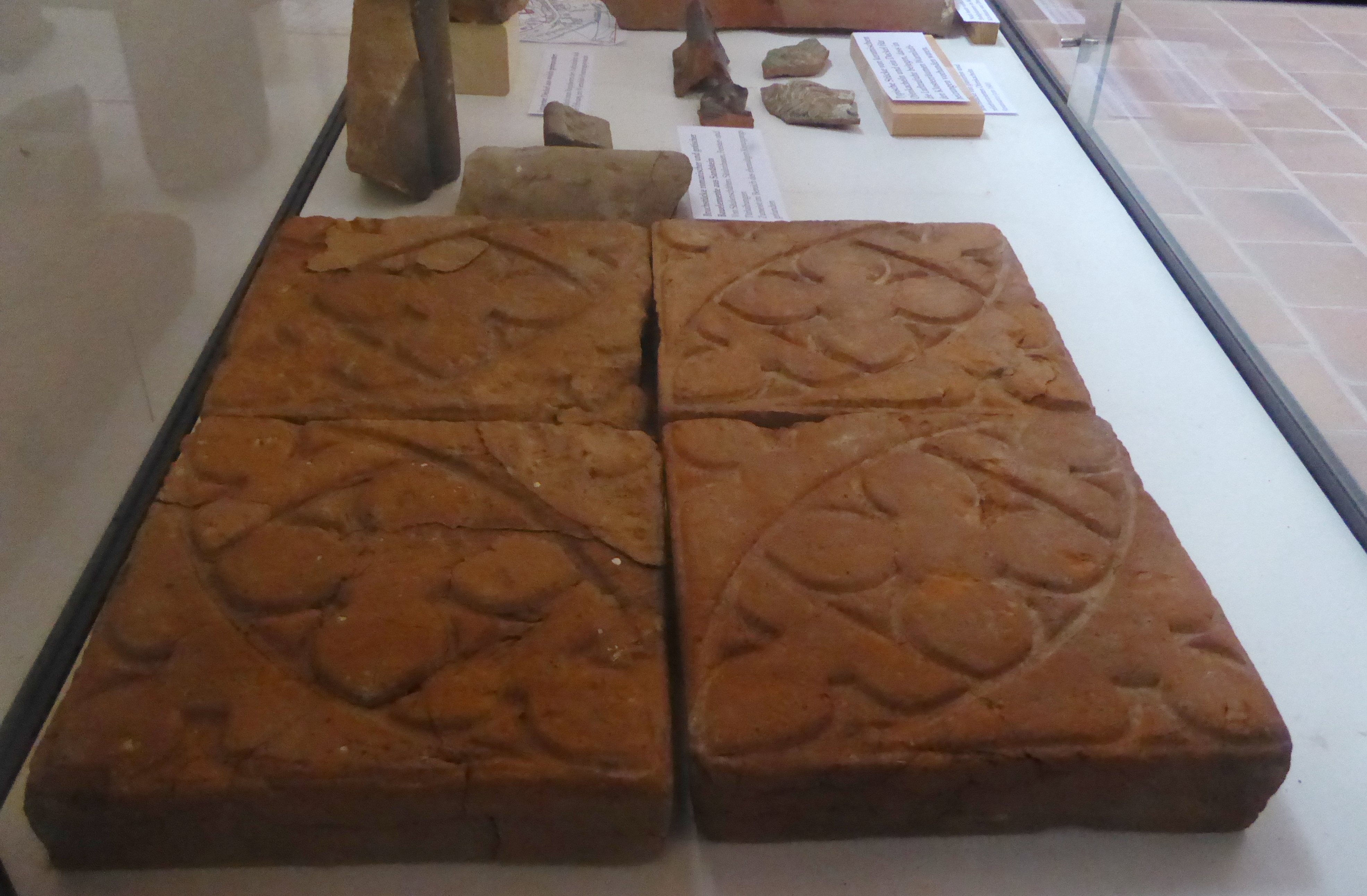 Gotische Maßwerkfliesen, gefunden 1993 im Fußboden einer nach außen offenen Nische (zugemauerte Türöffnung zum Kreuzgang) in der Nordwand der ehemaligen Klosterkirche in Reinhausen, Gemeinde Gleichen, Südniedersachen. Anhand von Scherben der darüberliegenden humosen Ablagerungen auf das 13./14. Jahrhundert geschätzt. Ausstellung in der Kirche, im Hintergrund in der Vitrine weitere archäologische Funde vom Kirchberg Reinhausen.